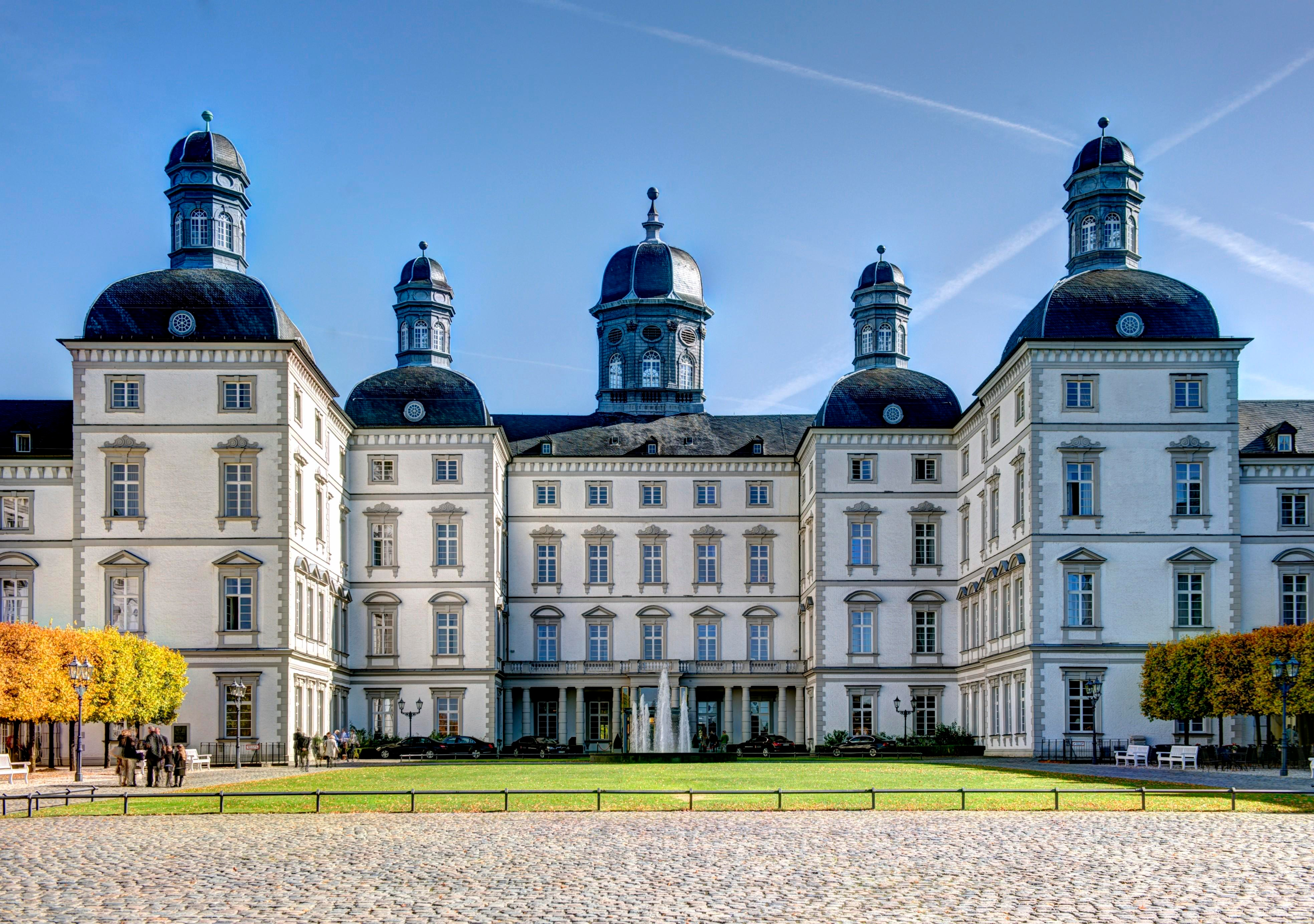 Bensberg Neues Schloss Denkmal 136This is a photograph of an architectural monument., no. 136